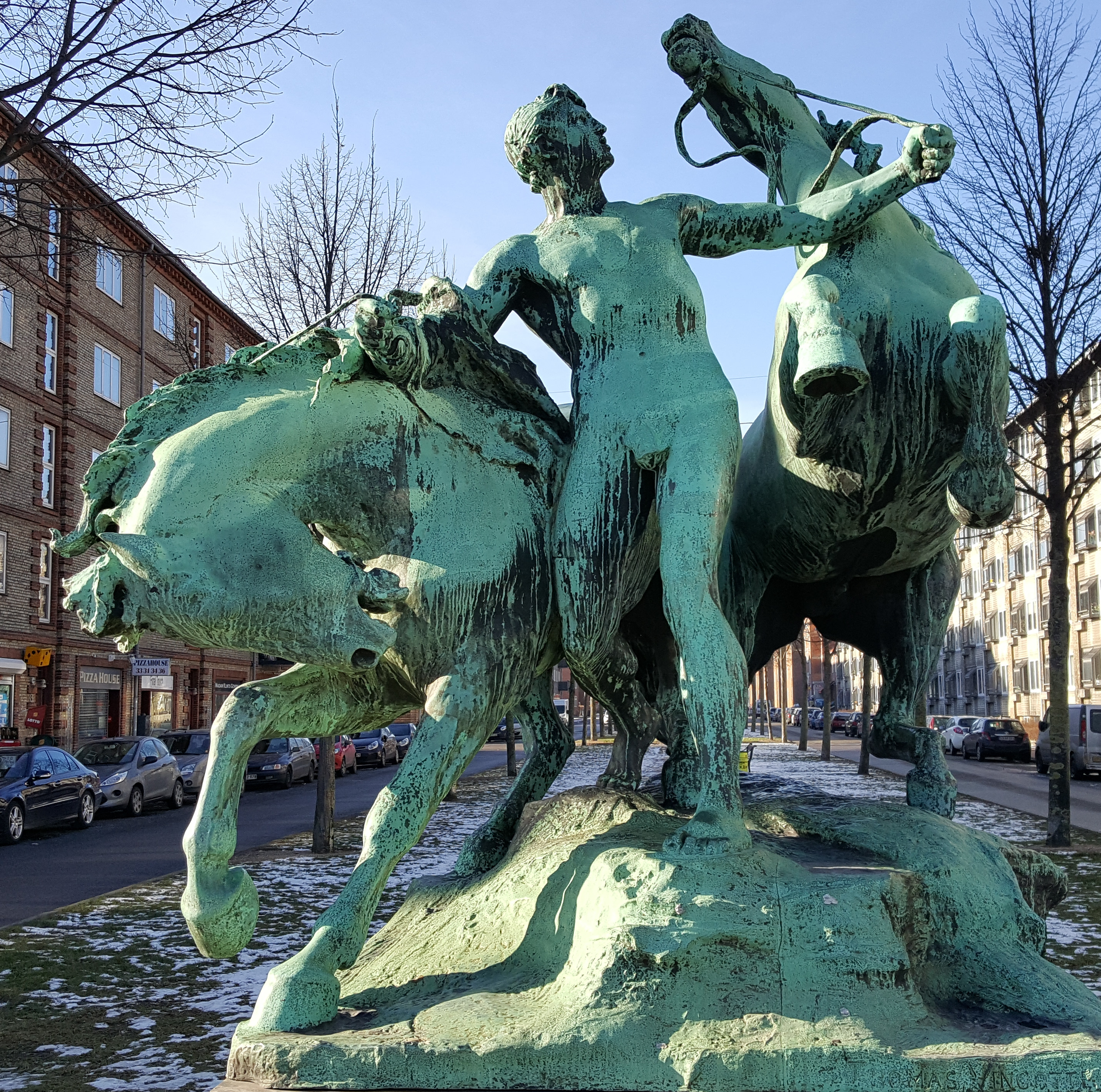 Thomas Vincotte (1850-1925)s statue står hvor Bavnehøj allé munder ud i Enghavevej i Valby, København